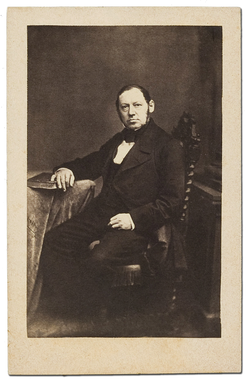 Ernst Sillem (1807-1861) omstreeks 1840